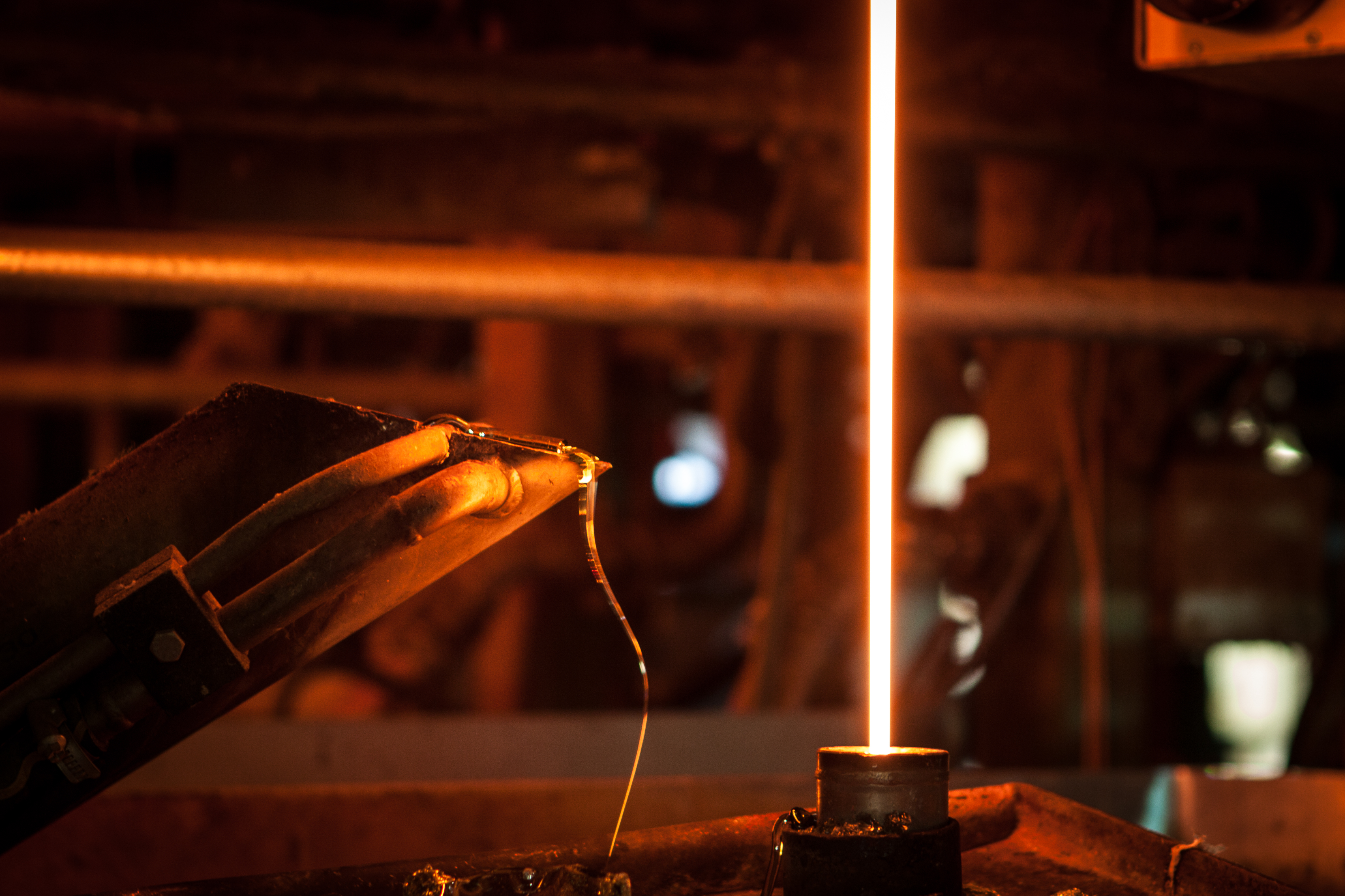 Herstellung von Glaswolle. Flüssiges Glas läuft in eine Zerfaserungsmaschine.